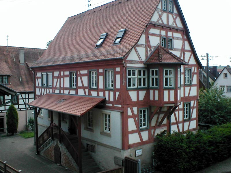 Historisches Fachwerkhaus bei der ev. Kirche in Sinsheim-Hoffenheim